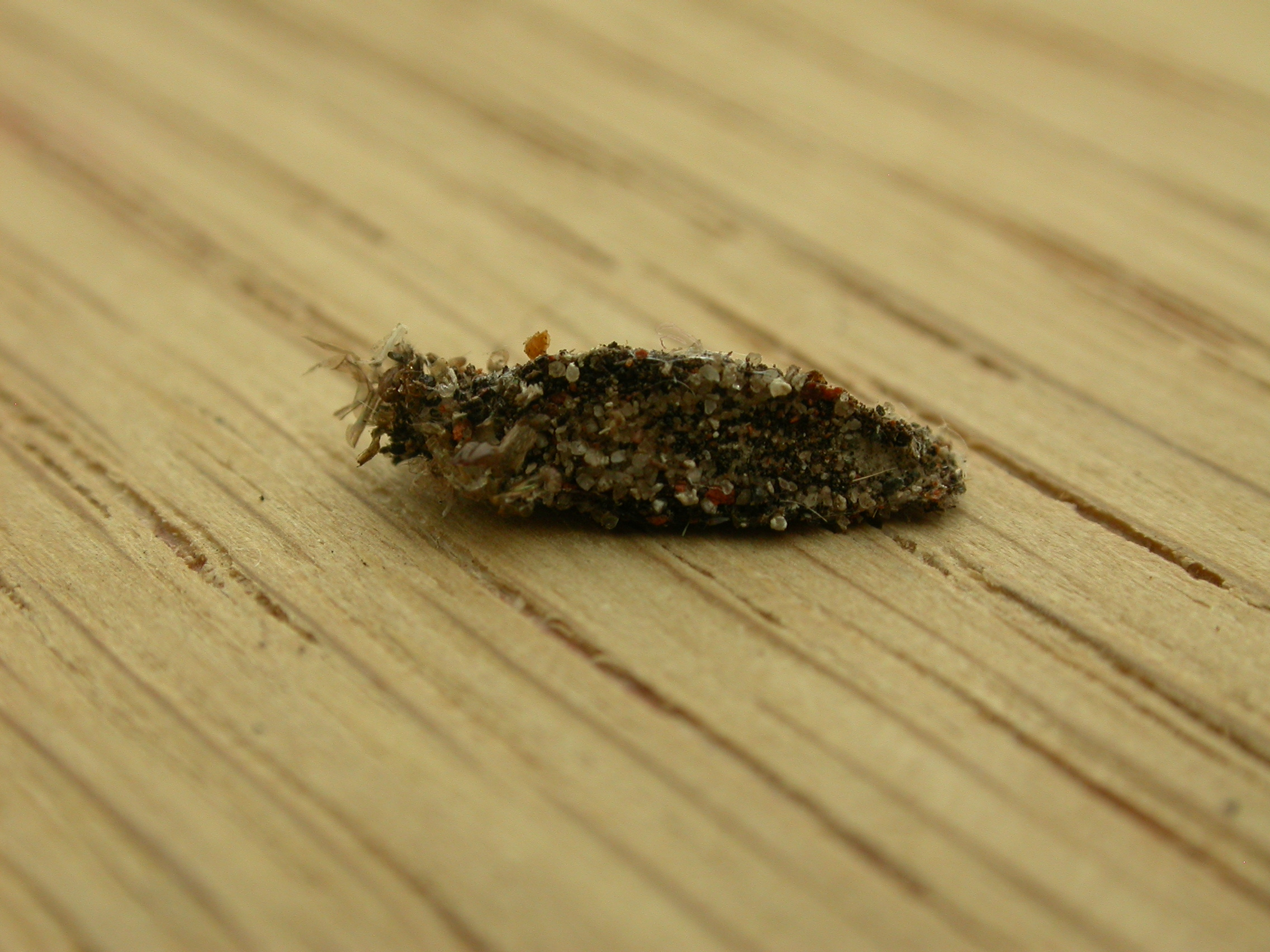 Dahlica triquetrella (Hübner, 1813), Hellerup, Denmark, 20 October 2012